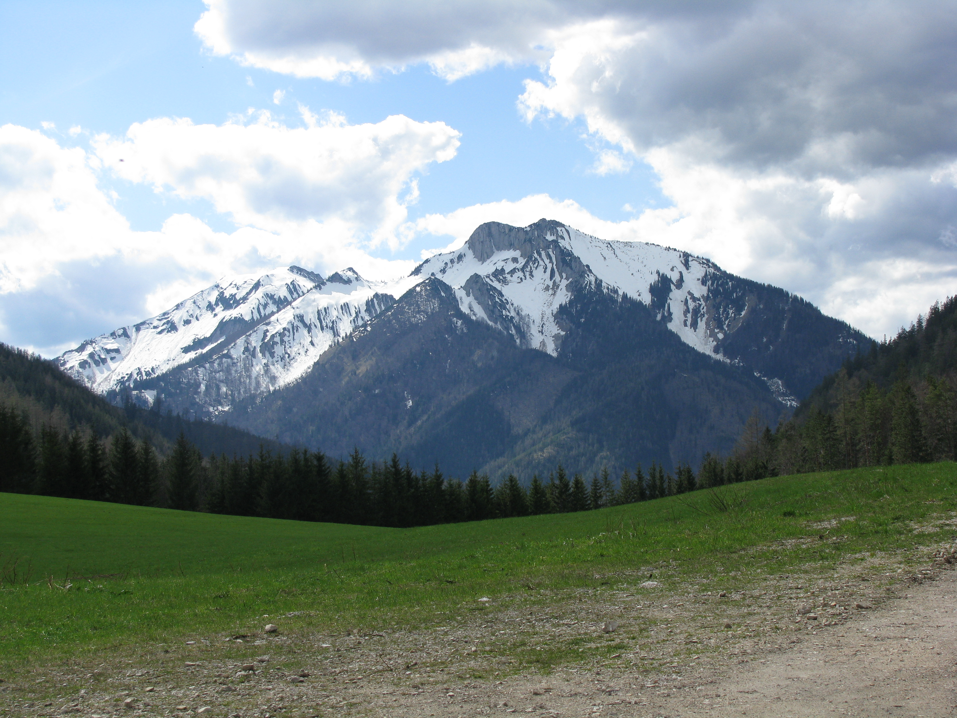 Voralpe im Naturpark Eisenwurzen. Links der Tanzbodengipfel, rechts die Stumpfmauer.